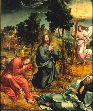 De acordo com uma nota escrita pelo Dr. José de Figueiredo no Livro 1º da Entrada de Correspondência, os seis quadros que formam o retábulo dito de Santos-o-Novo, estavam no coro de baixo da igreja do respectivo mosteiro no ano de 1911, data da entrada do conjunto no Museu das Janelas Verdes. Passa-se a transcrever parcialmente o documento citado (fl.6): "Em 22 do corrente (Agosto de 1911) esteve o Director do Museu no Recolhimento de Santos-o-Novo a receber vários objectos ali existentes, em virtude do despacho do Ex.mo Ministro da Justiça. Esses objectos, entregues ao Director na presença de dois vogais da Comissão Jurisdicional das Extintas Congregações, são: 6 quadros de madeira do século XVI escola de Lisboa, representando respectivamente a «Anunciação», «Natividade», «Adoração dos Reis Magos», «Cristo no Horto», «Enterro de Cristo» e «Ressurreição de Cristo» e estavam no coro de baixo da referida Igreja;..."(cf. João Couto, O retábulo quinhentista de Santos-o-Novo, p.13, nota 1).